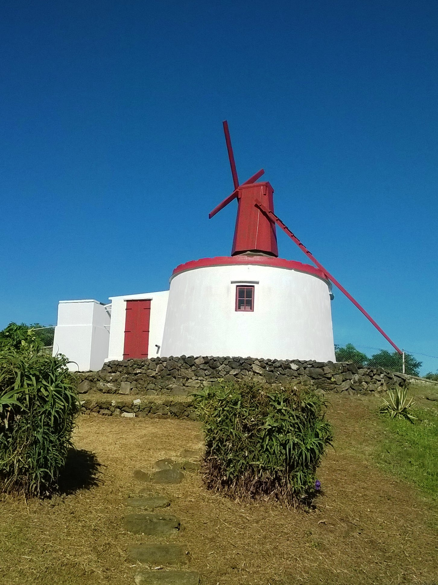 Moinho de Vento da Ponta Negra (Escola Básica Integrada dos Biscoitos), ilha Terceira, Açores, Portugal: "ex libris" da escola.